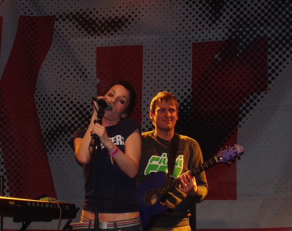 Kira bei der Grönland Labelnight in Wien am 28.01.2005